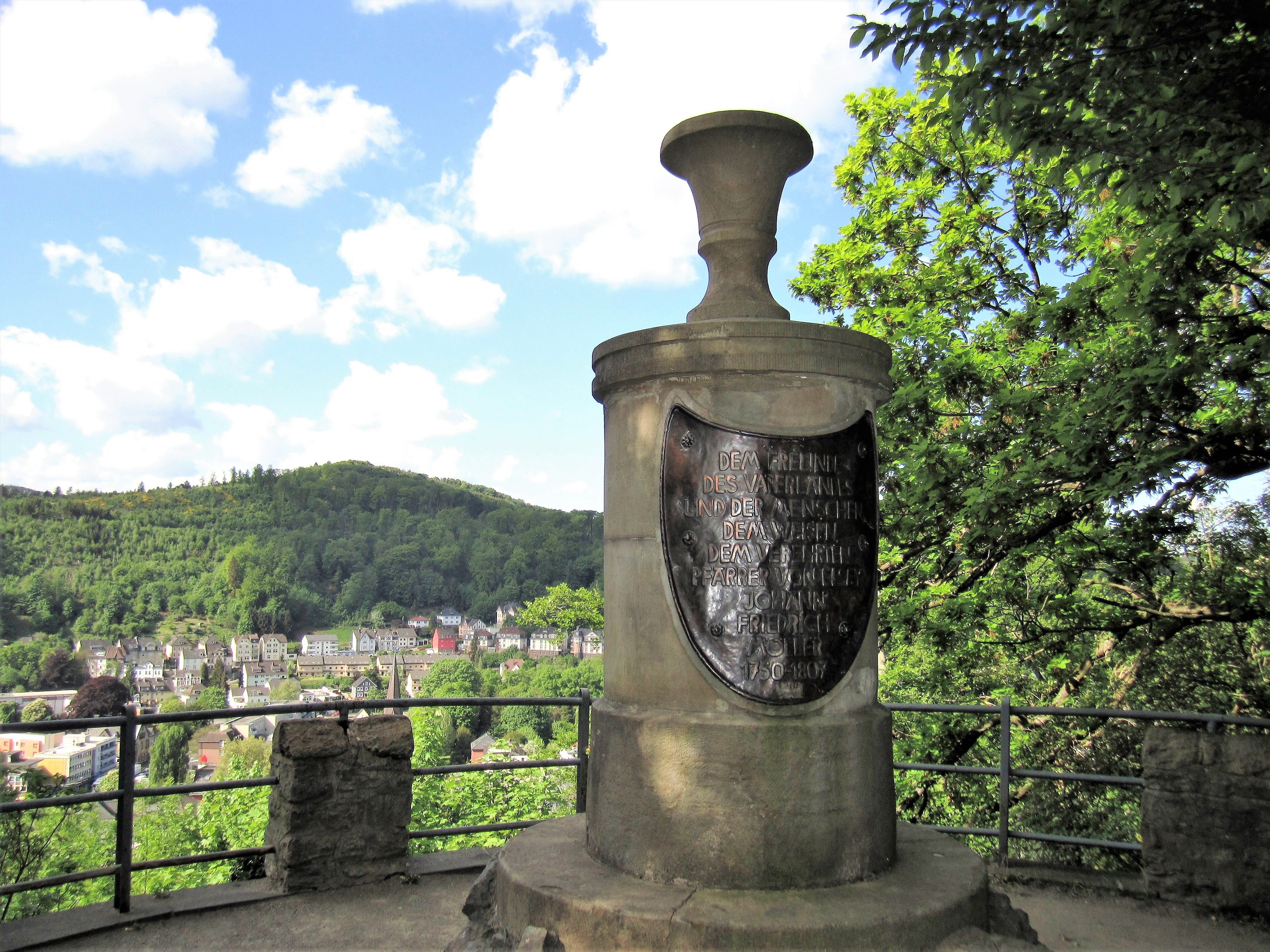 Möllerdenkmal am Klippchen im Hagener Stadtteil Hohenlimburg-Elsey, Burgweg. Ein Wahrzeichen von Hohenlimburg und eines der ältesten Denkmäler in der Region. Es wurde zu Ehren des bedeutsamen Elseyer Pfarrers, Politikers und Heimatforschers Johann Friedrich Möller (1750–1807), einem der wichtigsten Vertreter der Aufklärung in Westfalen, errichtet. Nach einem Entwurf des Architekten Wilhelm Tappe wurde das Denkmal am 7. Mai 1814 eingeweiht. Vor 1930 wurde das Denkmal und sein Standort umfassend verändert. In den 1950er Jahren ersetzte eine Schrifttafel aus Messing die verwitterte Widmung auf der Säule; zuletzt wurde das Denkmal 1995 restauriert. Die Inschrift auf der Tafel lautet: „DEM FREUNDE DES VATERLANDES UND DER MENSCHEN, DEM WEISEN, DEM VEREHRTEN PFARRER VON ELSEY JOHANN FRIEDRICH MÖLLER 1750–1807“.